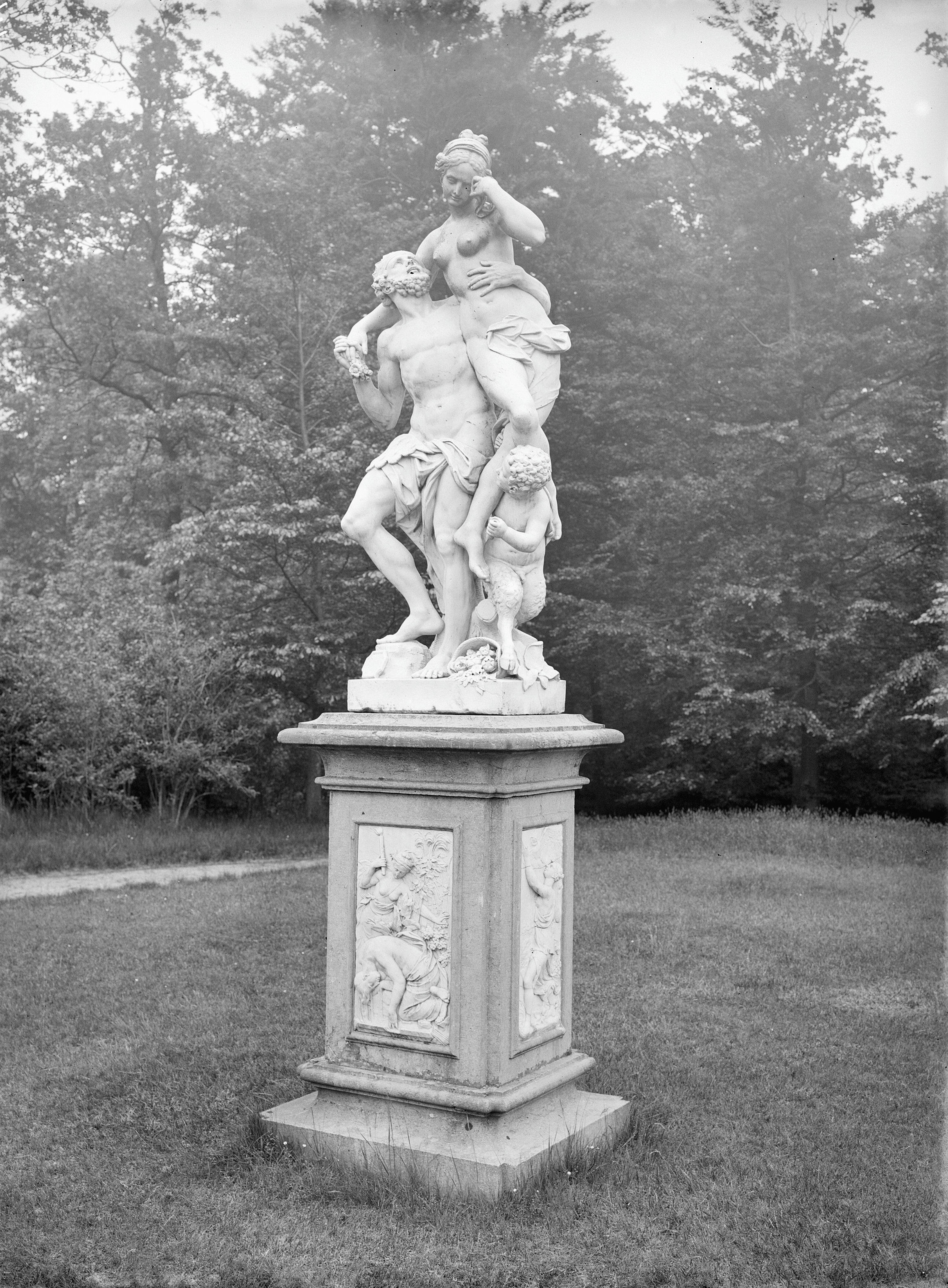 Huis "Meer en Berg": marmeren groep: de roof van Proserpina, door Jan Claudius de Cock